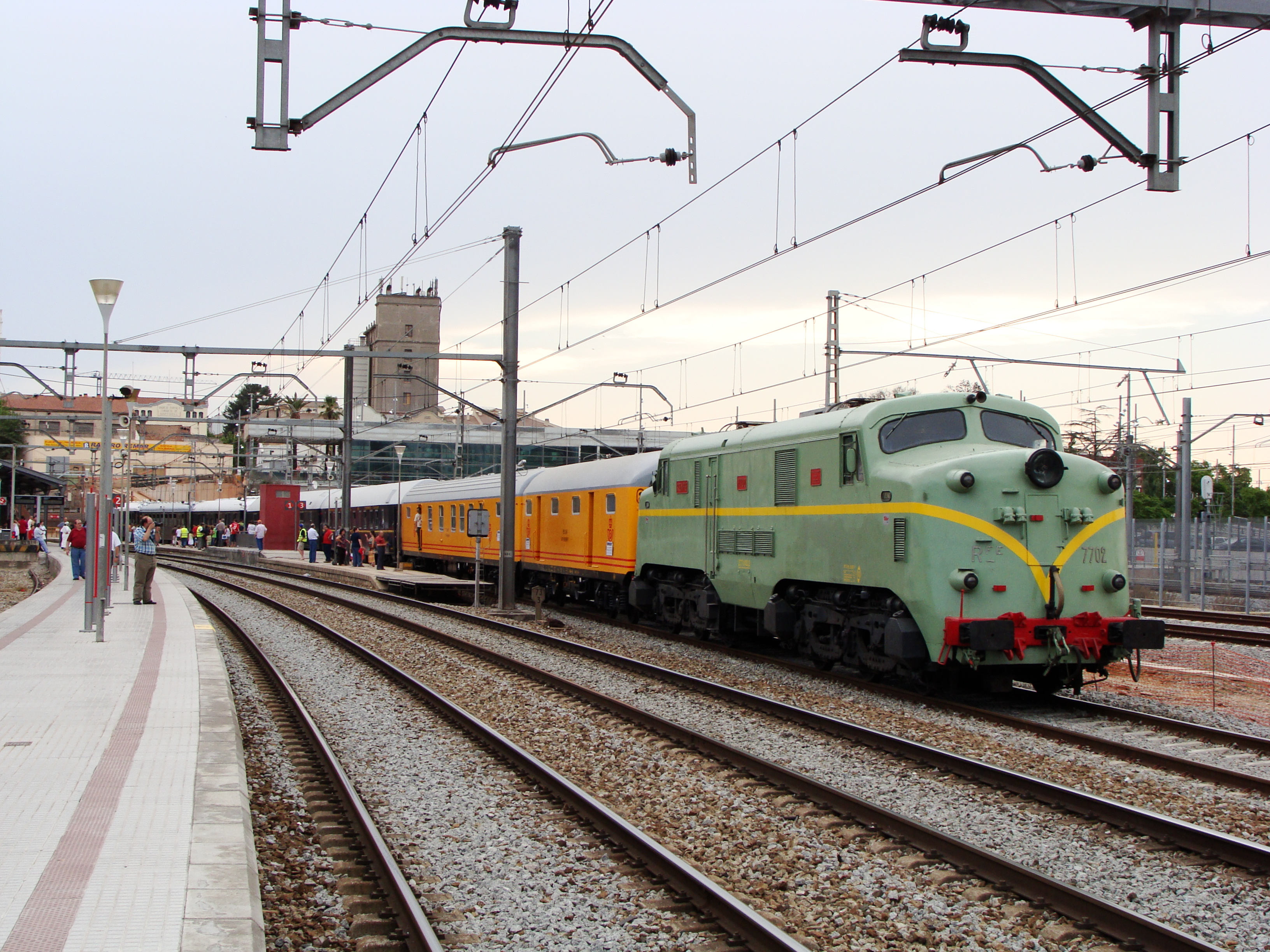 La locomotora 7702, con el tren conmemorativo del 150 aniversario de la llegada del tren a Martorell, formado por un furgón de Correos, estafeta de Correos, coche cama YF, coche cama T-2, coche restaurante CIWL, coche serie 5000 y coche salón ZZ-1601, en la estación de Martorell.